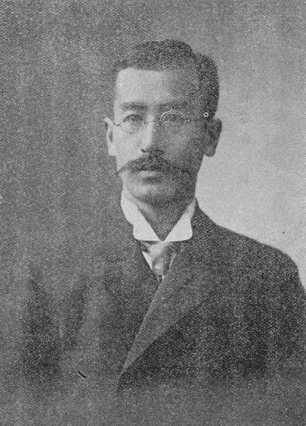 Portrait of Koaze Tsutau (小疇伝, 1874 – 1912)